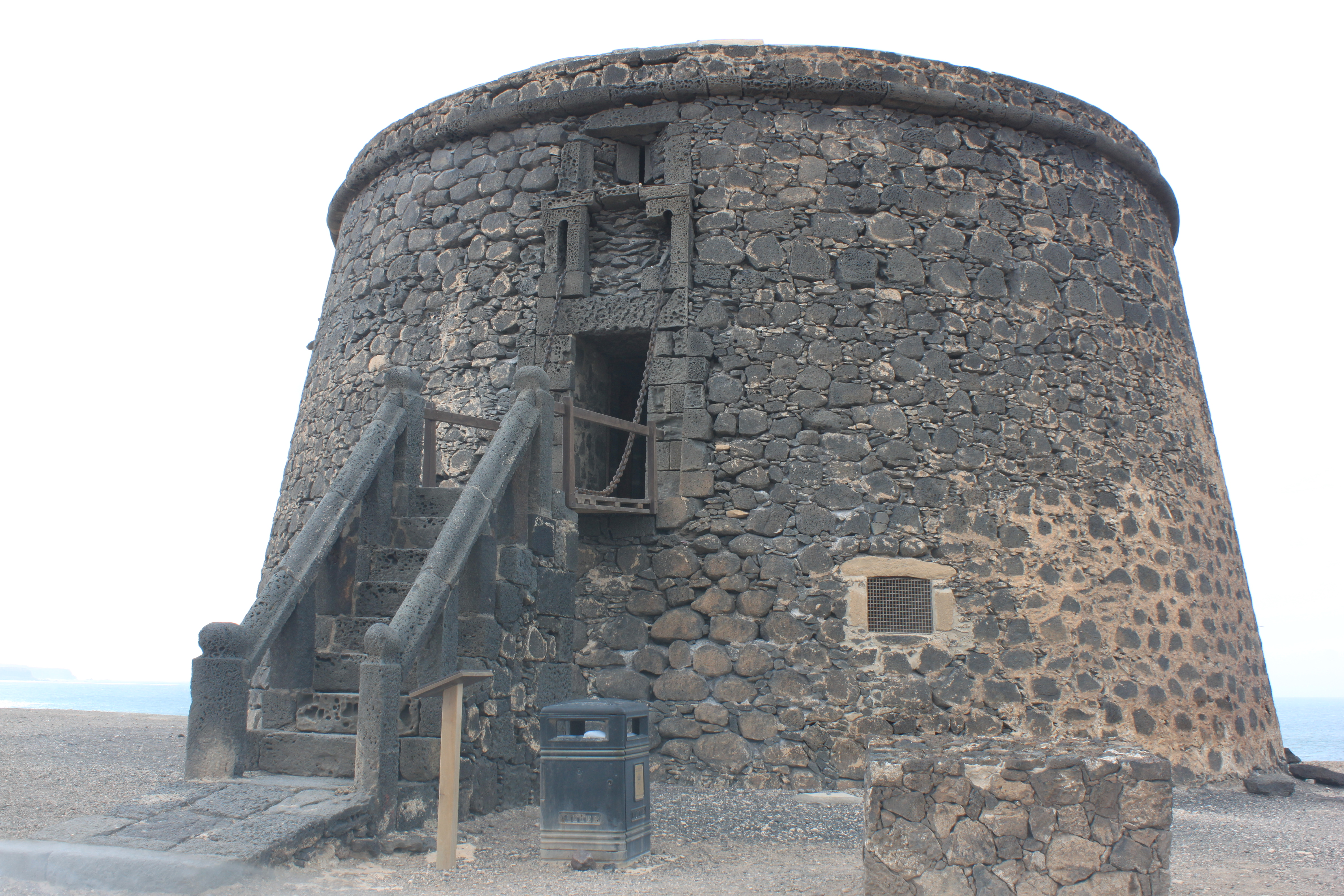 antiguo torreón-fortaleza